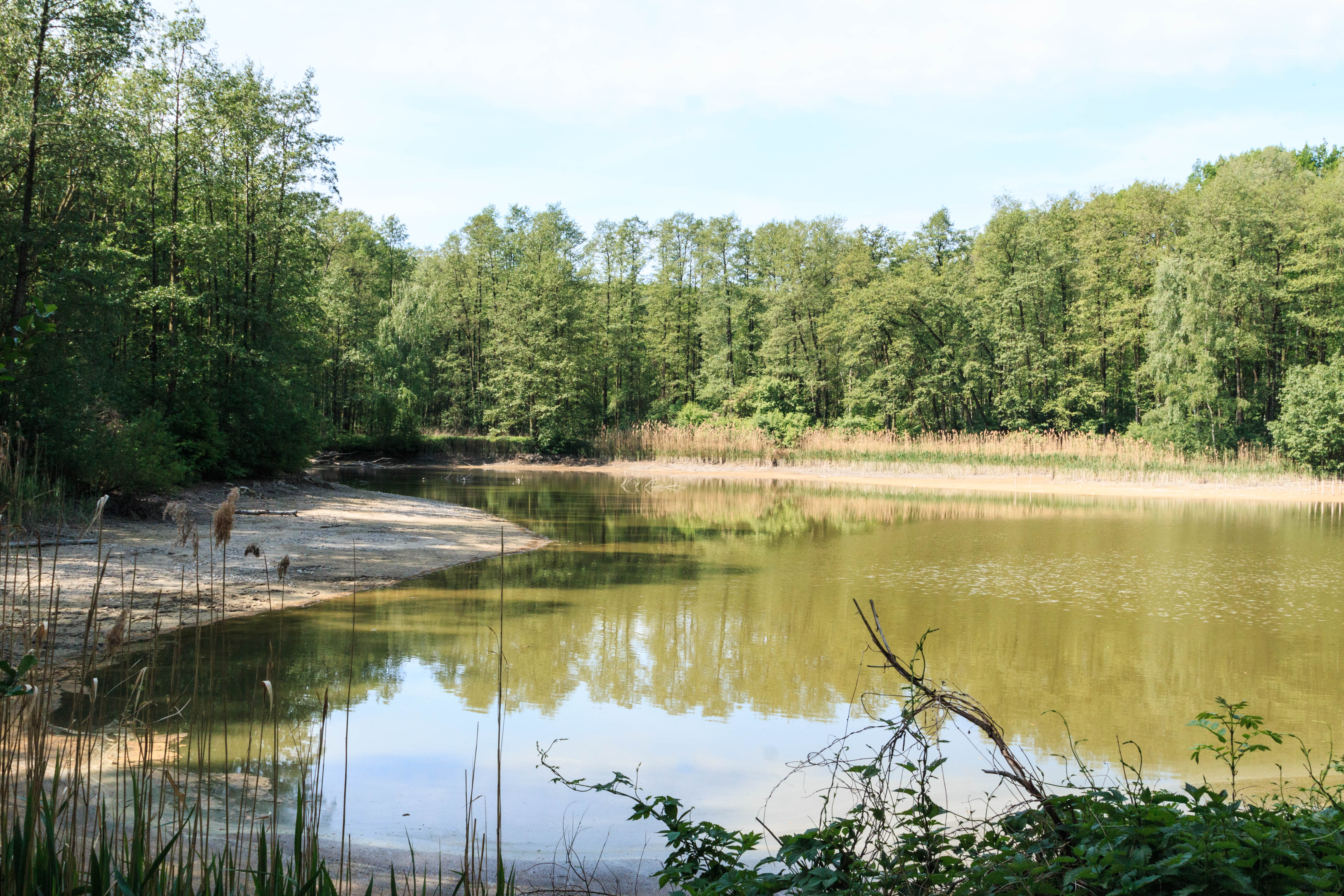 Crkáňský rybník u Kokešova Project: Vodstvo.